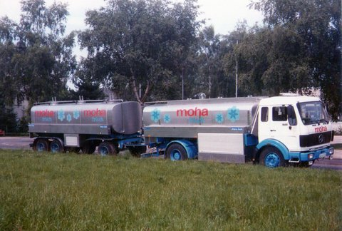 Ahrens & Bode abo-Condor Milchsammelwagen mit 11.000 Liter Fassungsvermögen auf Mercedes-Benz NG 1625